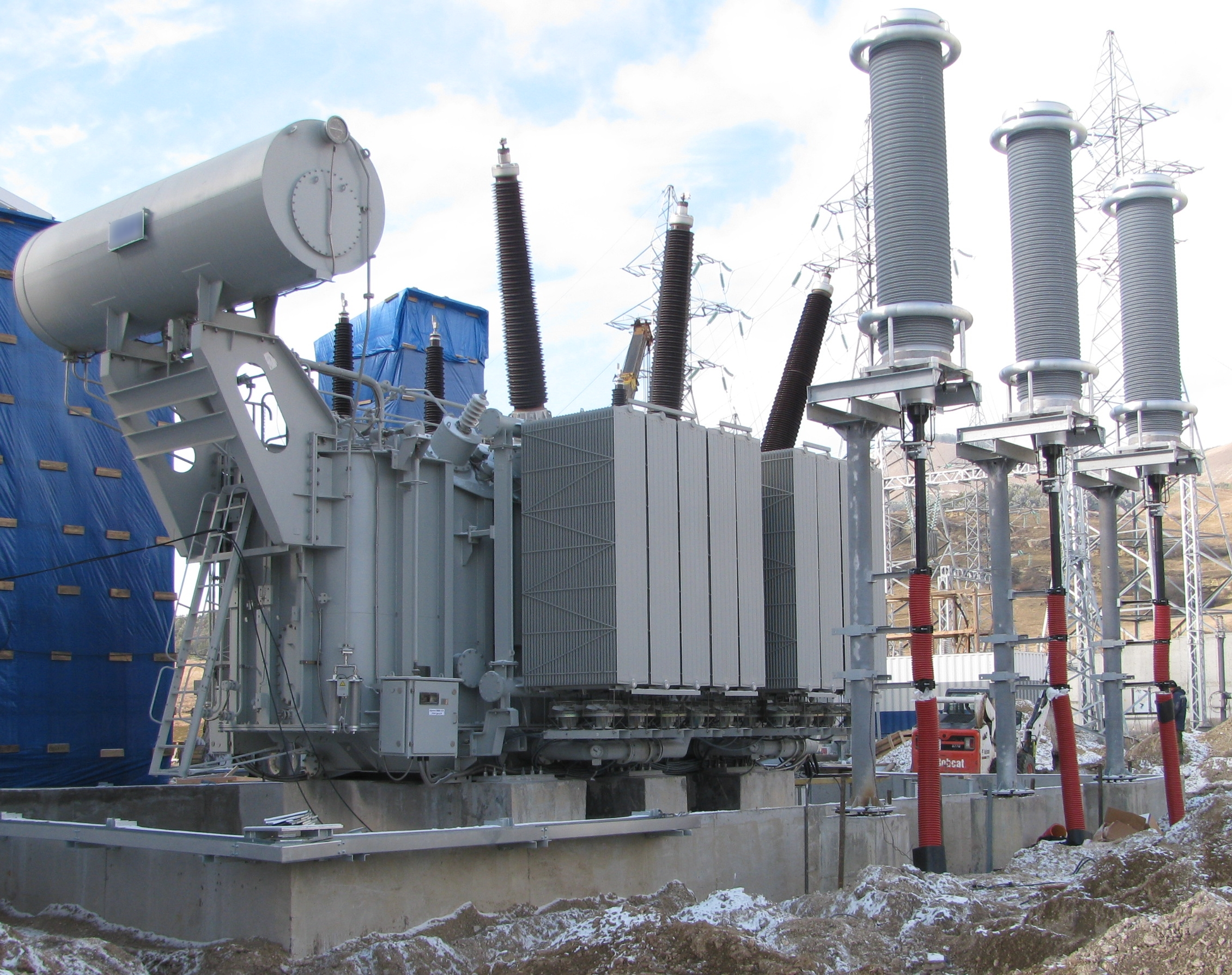 Автотрансформатор АТДЦТН-125000/330/110. Справа кабельные муфты 330 кВ.